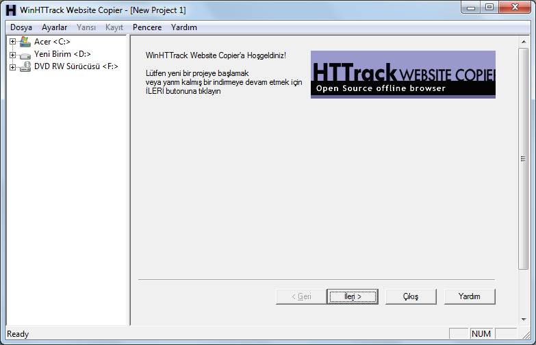 HTTrack yazılımının WinHTTrack arayüzü